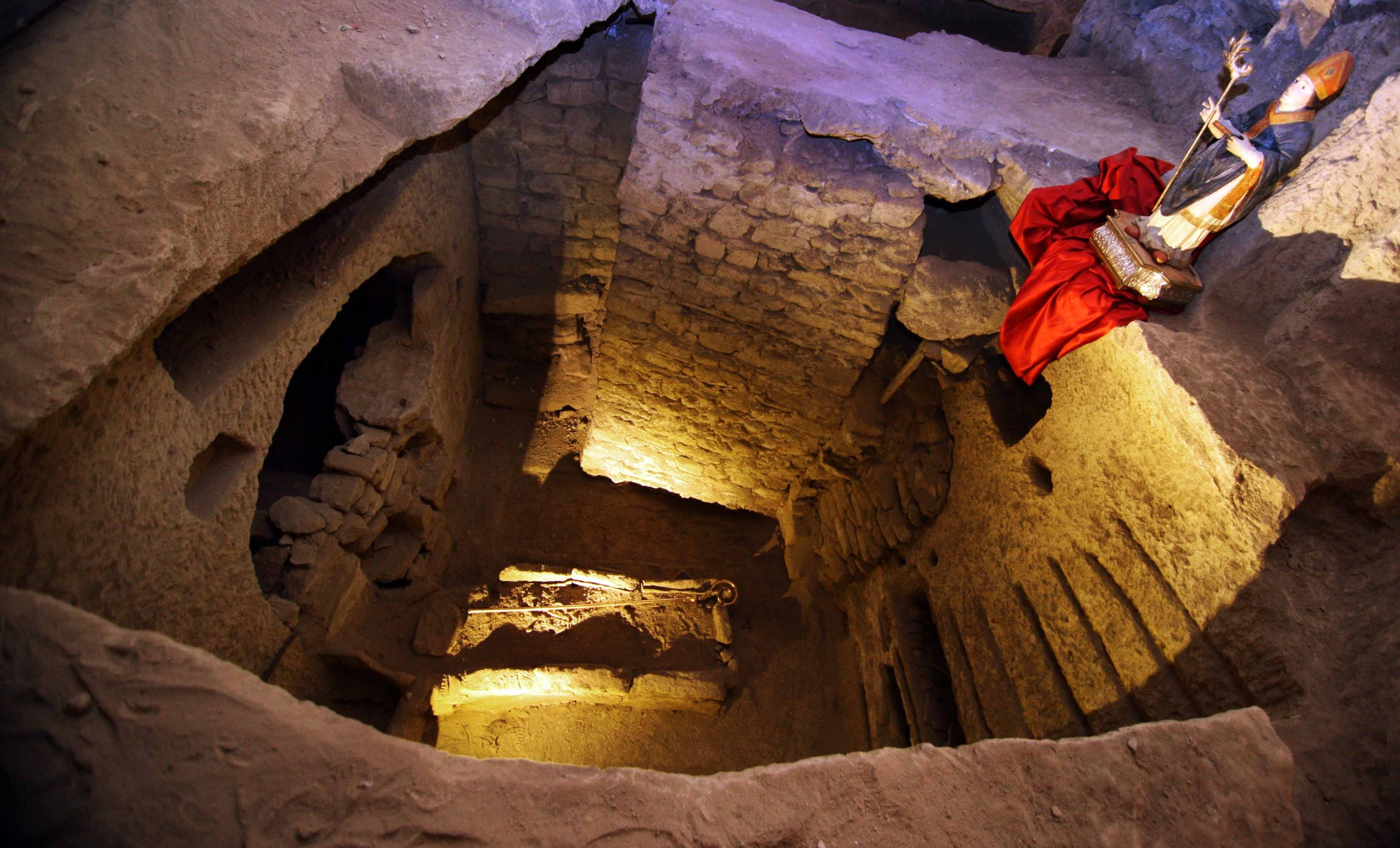 Tomba di San Gennaro vista dall'alto, presente all'interno delle Catacombe di san Gennaro La tomba è stato il primo luogo di sepoltura del Santo a Napoli